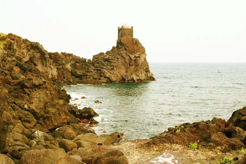 garitta di osservazione, XVI secolo presso lo scalo Pennisi di Santa Tecla (Acireale, CT)